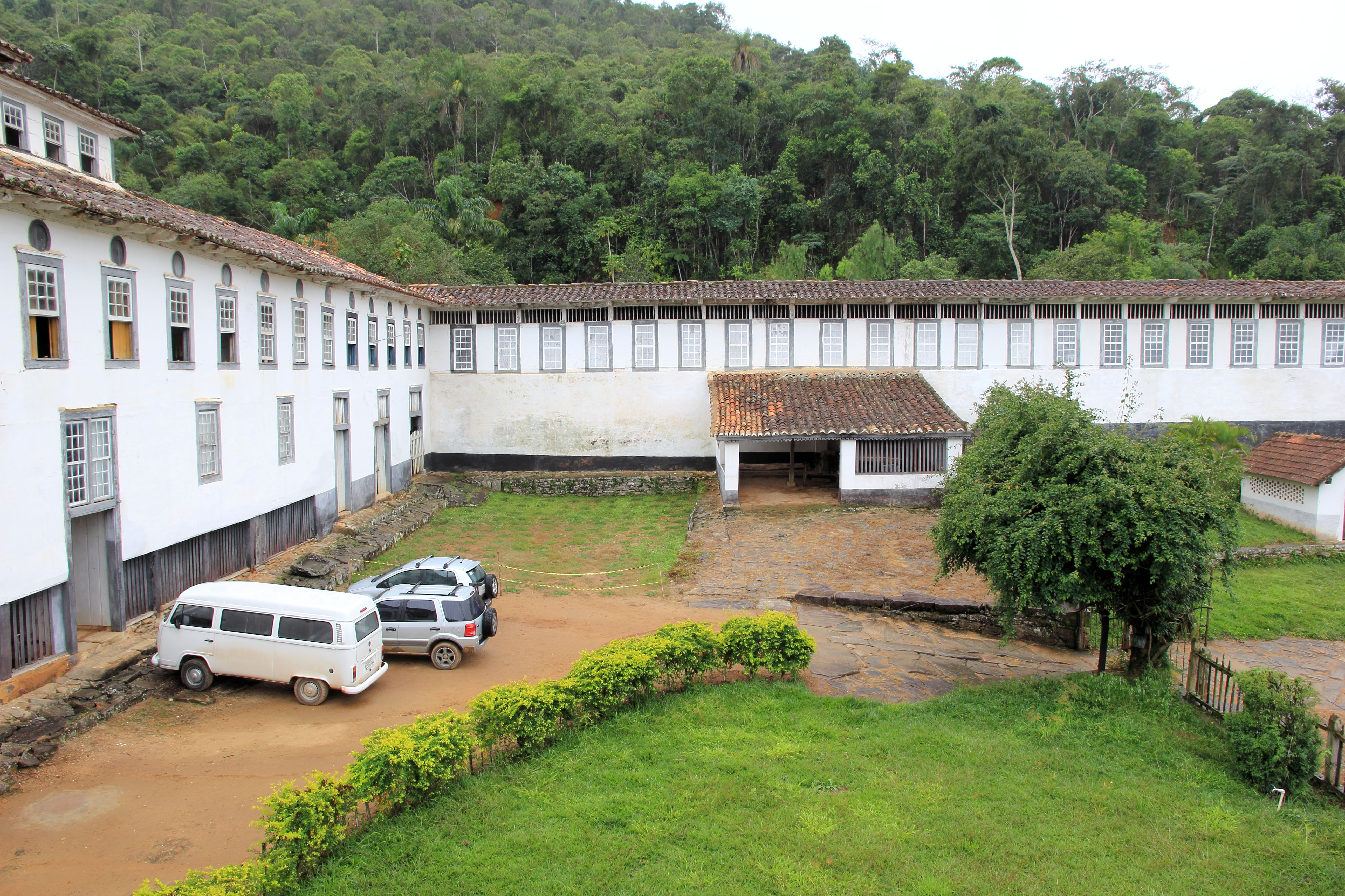 A Fazenda Santa Clara está localizada no município brasileiro de Santa Rita de Jacutinga, no estado de Minas Gerais.